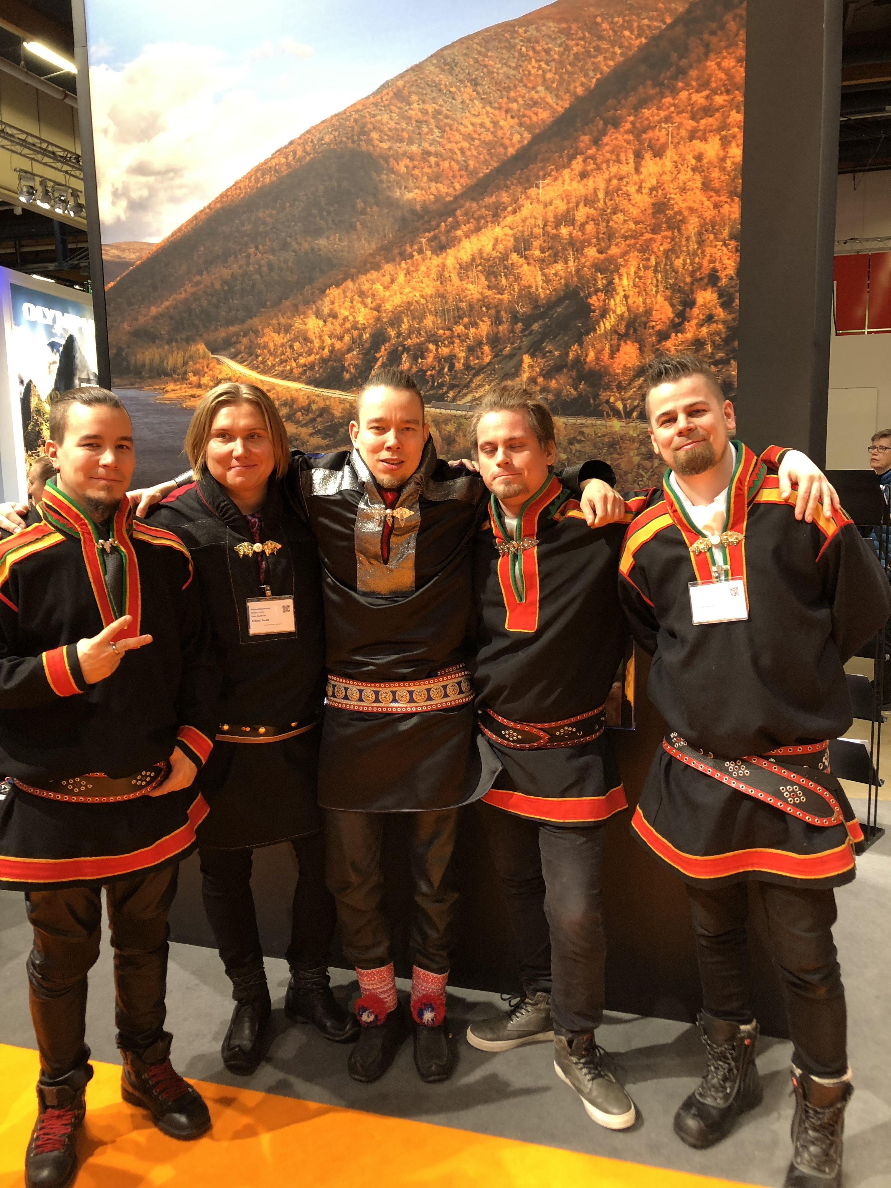 Auf der Reisemesse 2019 in Helsinki am Stand von Inari/ Saariselkä.